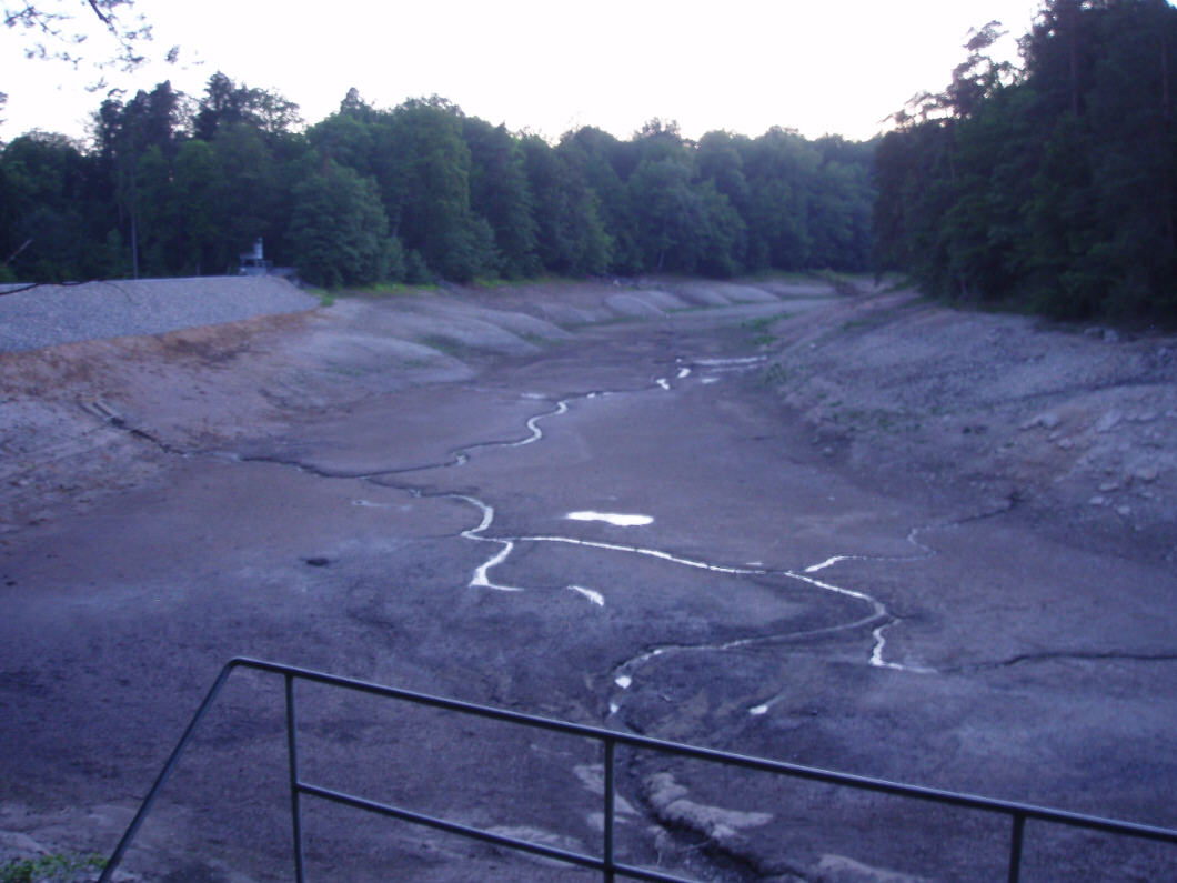 der abgelassene Neue See 2009